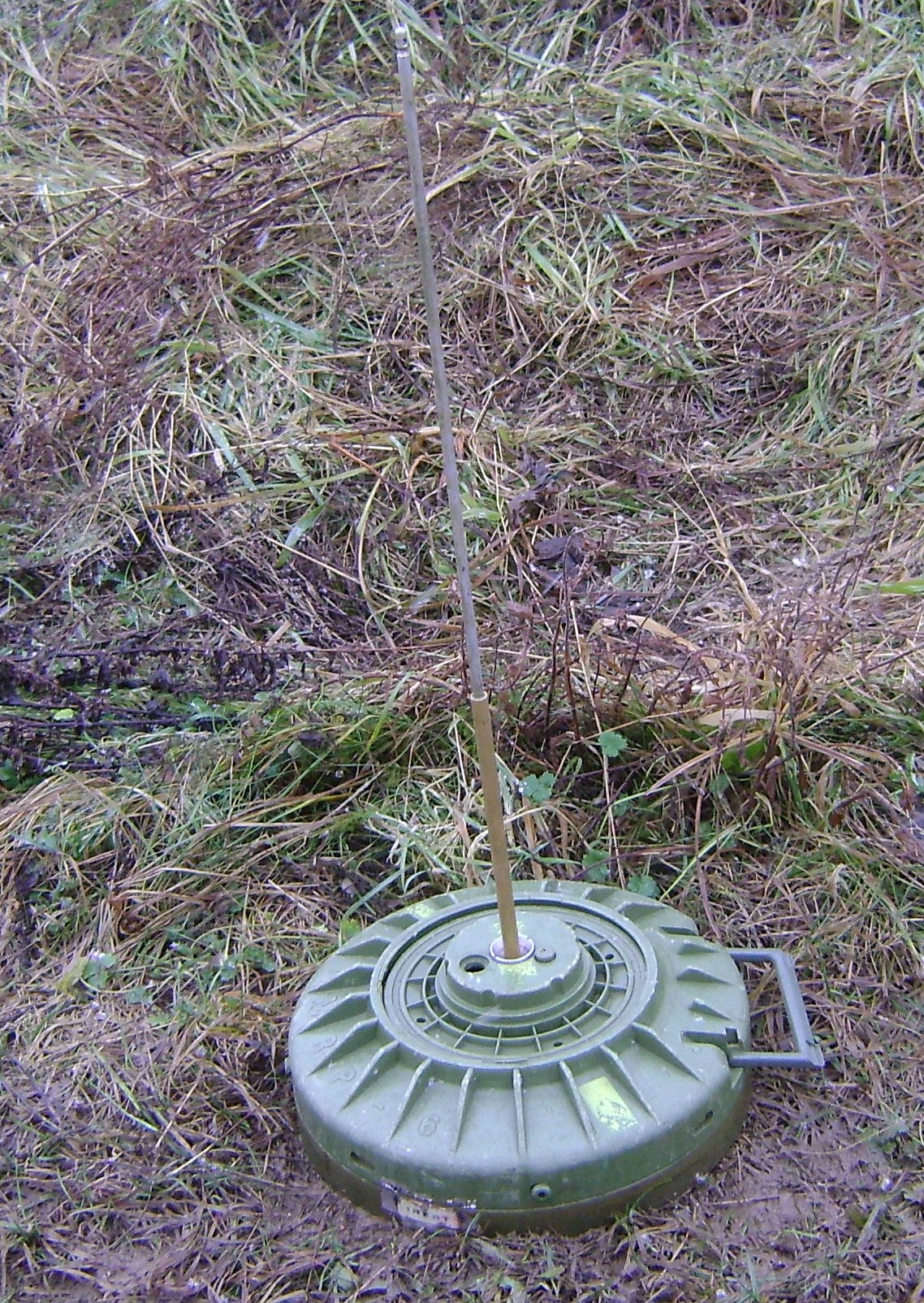 TMRP-6 mit Knickzünder